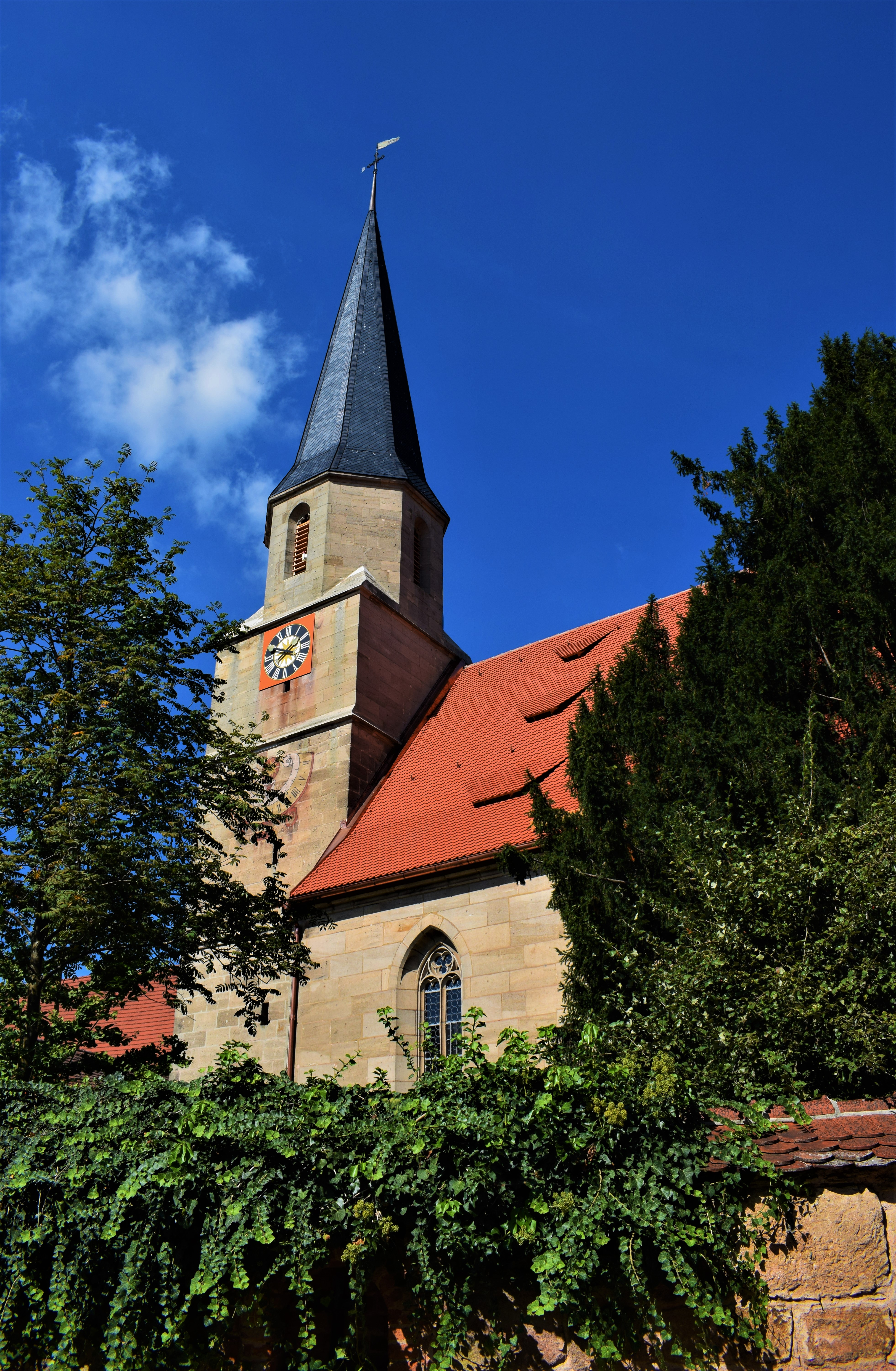 Rieterkirche Kalbensteinberg: Kirchturm